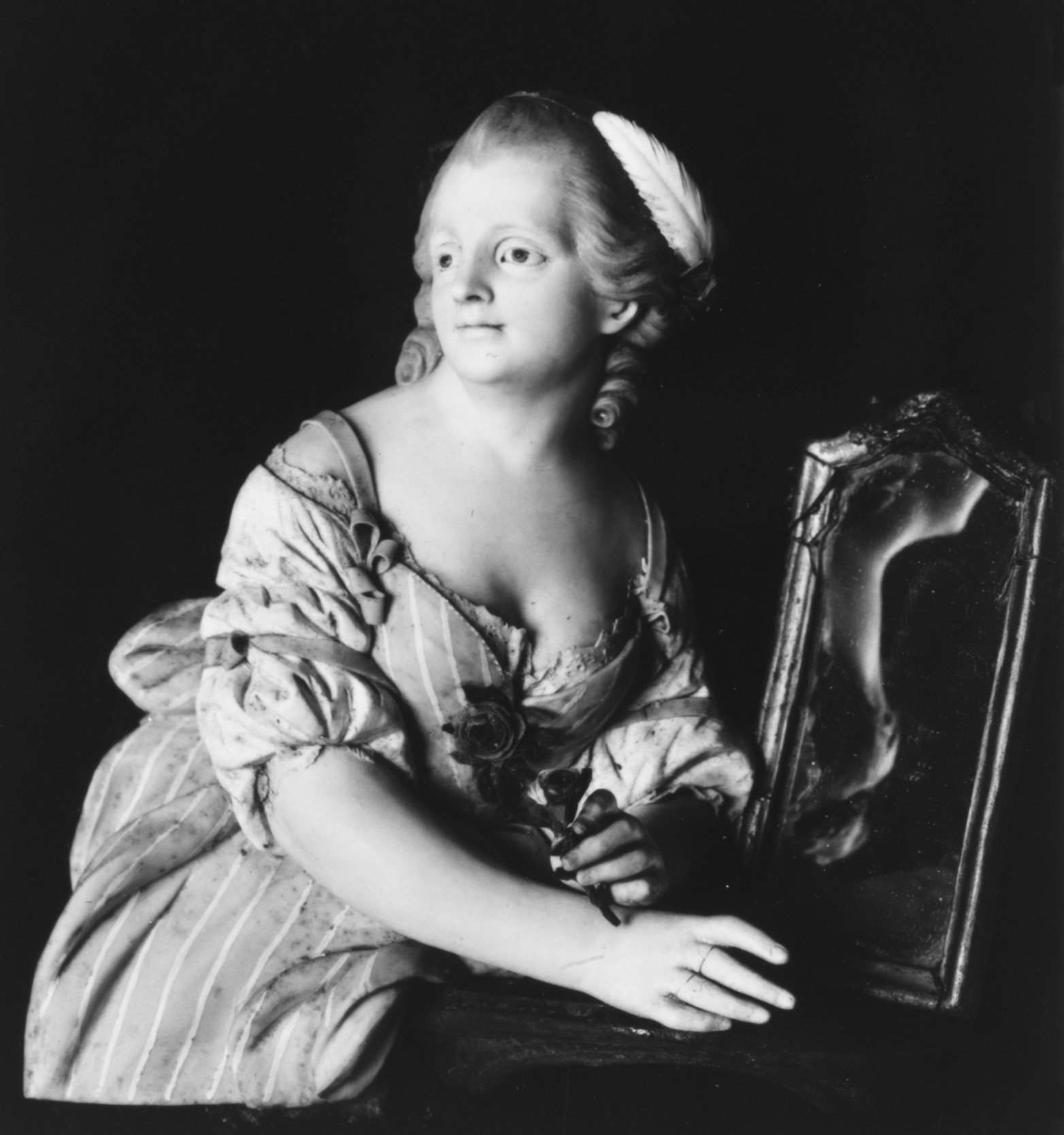 German, Cologne; Miniature sculpture; Sculpture-Miniature